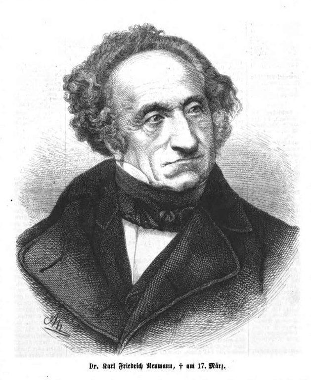 Karl Friedrich Neumann, deutscher Orientalist im 19. Jh.